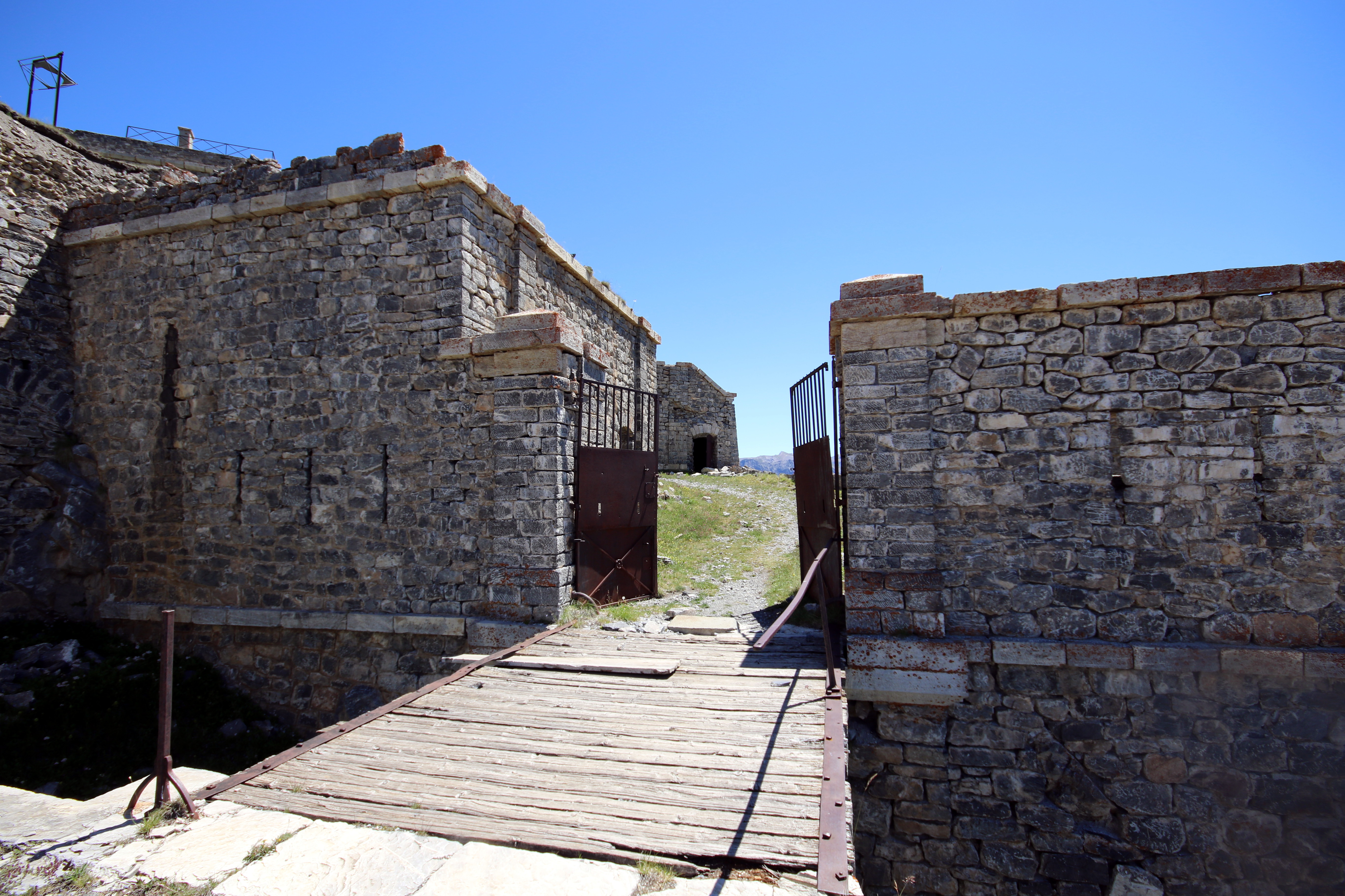 L'entrée_du_fort_de_l'infernet.jpg